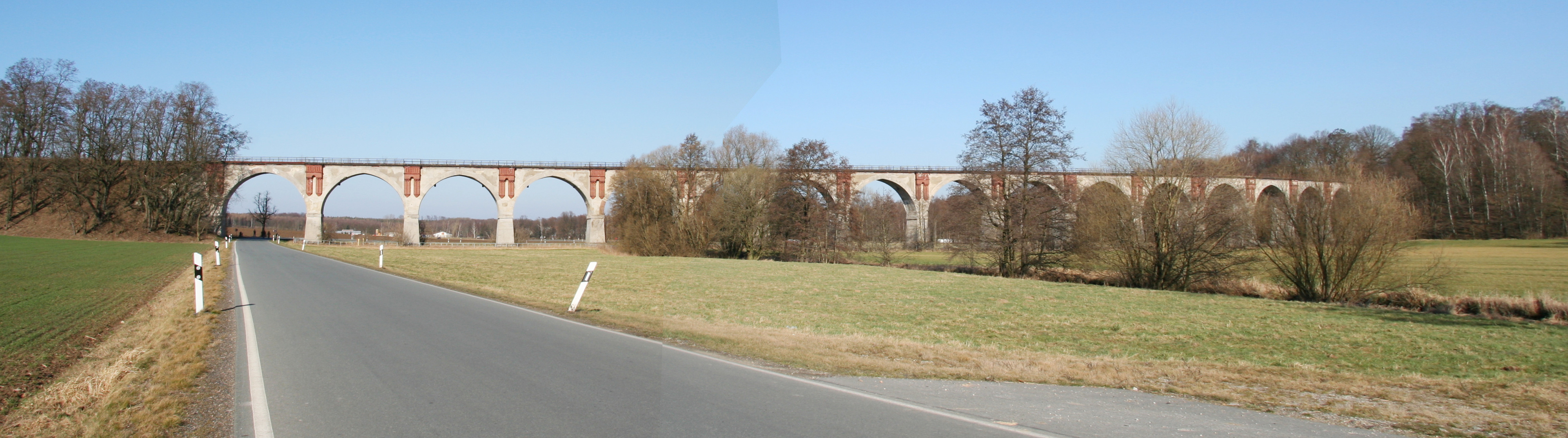 Brücke der Bahnstrecke Nobitz-Obergräfenhain über die Wiera